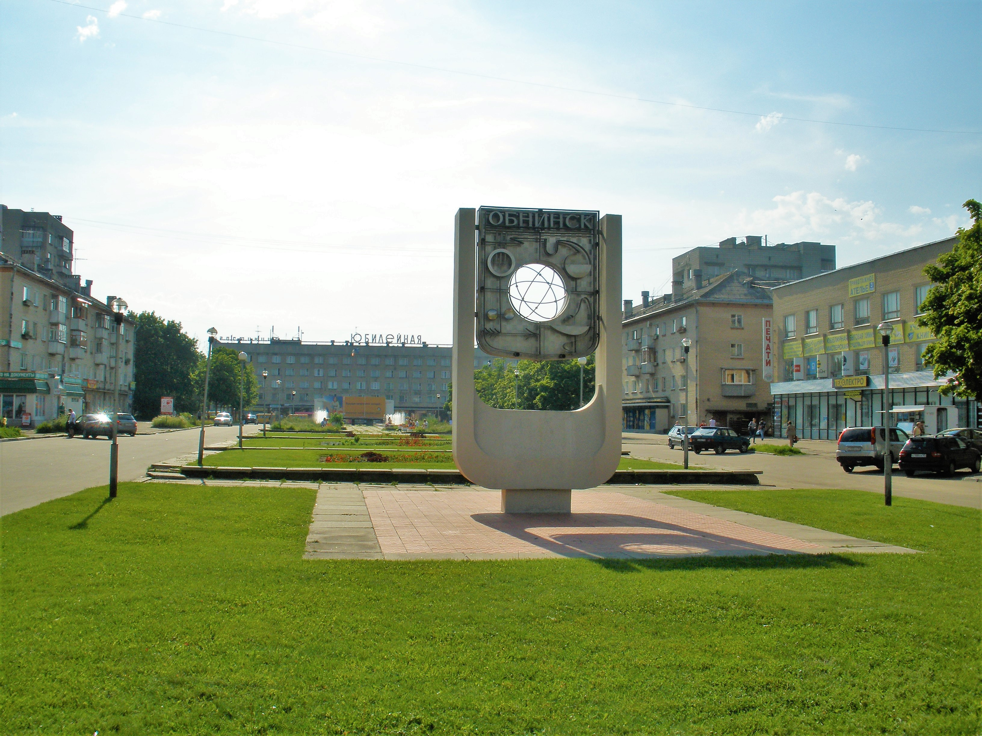 Ул.Лейпунского